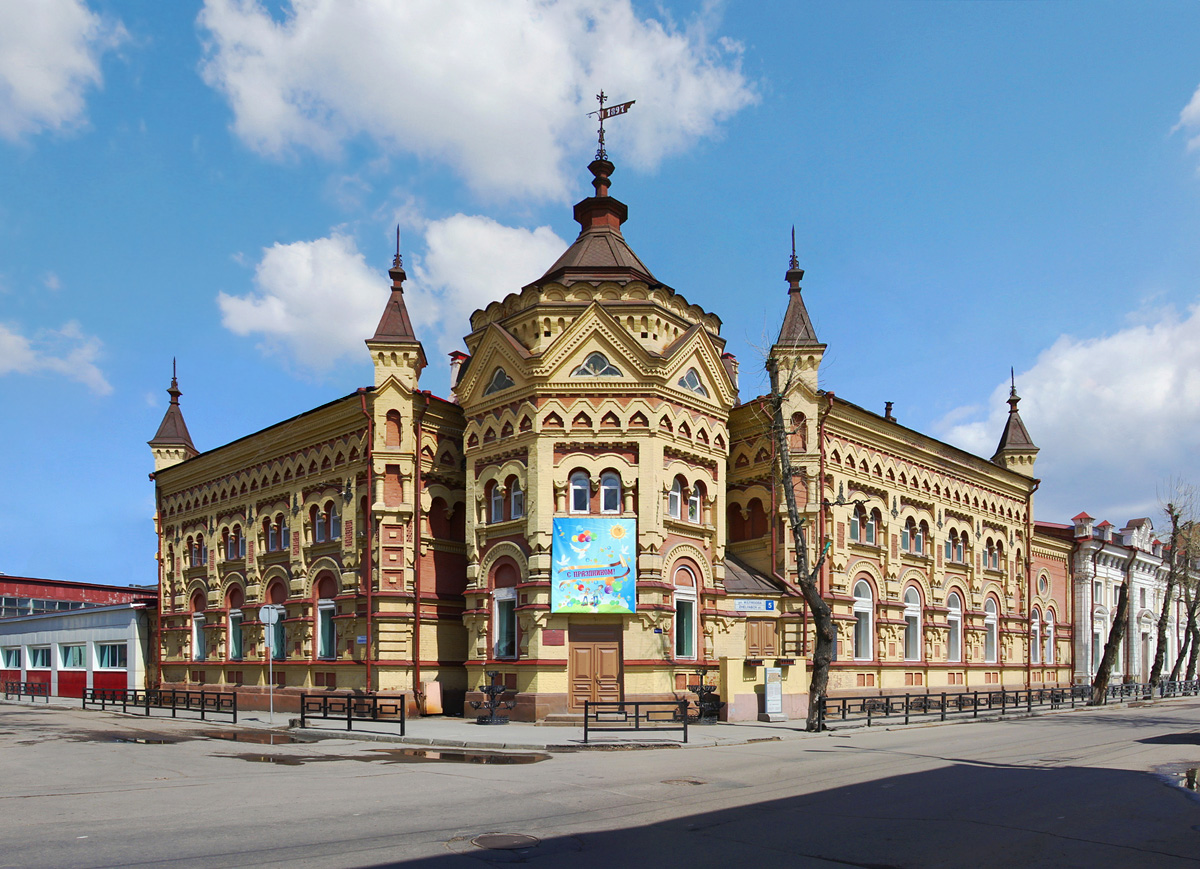 Усадьба Второва (Иркутская область, Иркутск, Желябова улица, 5)